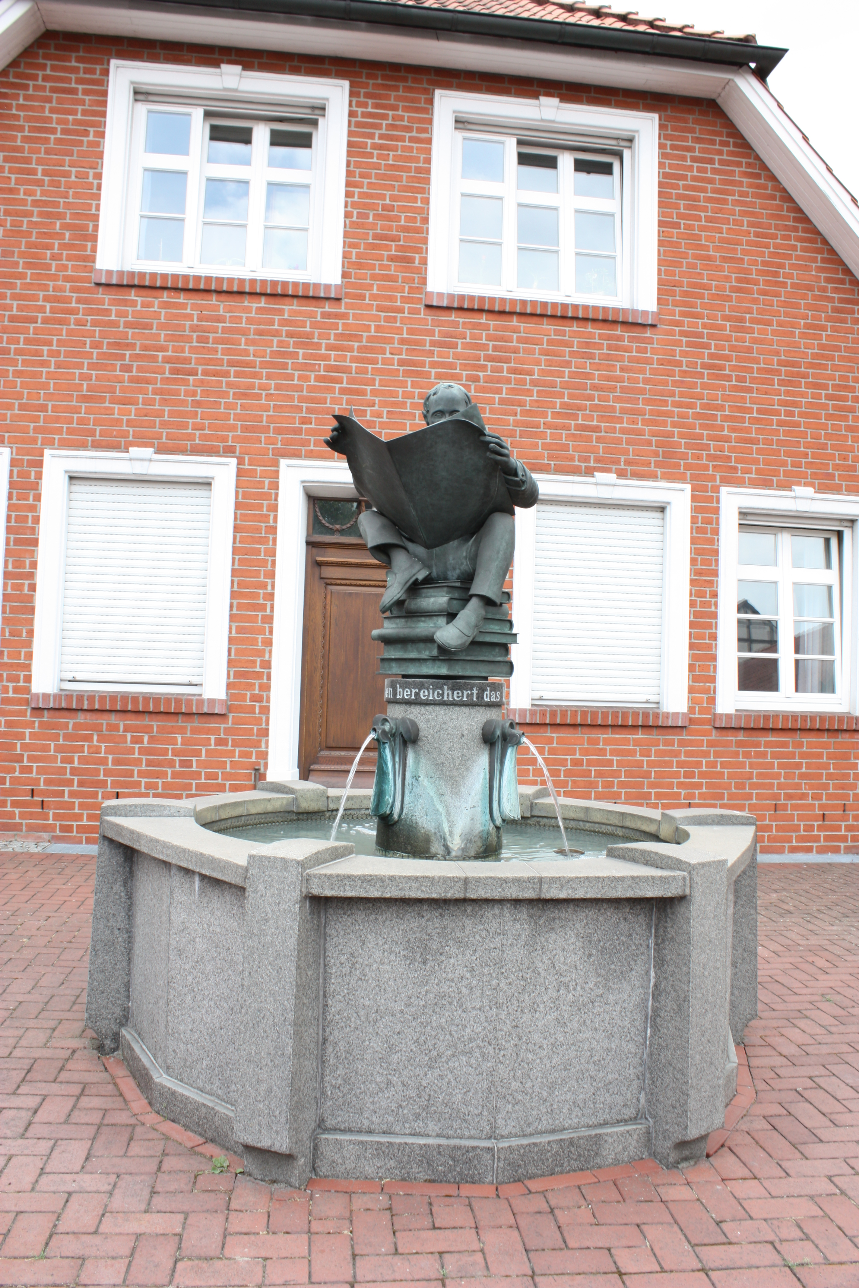 Sulingen, Landkreis Diepholz, Niedersachsen